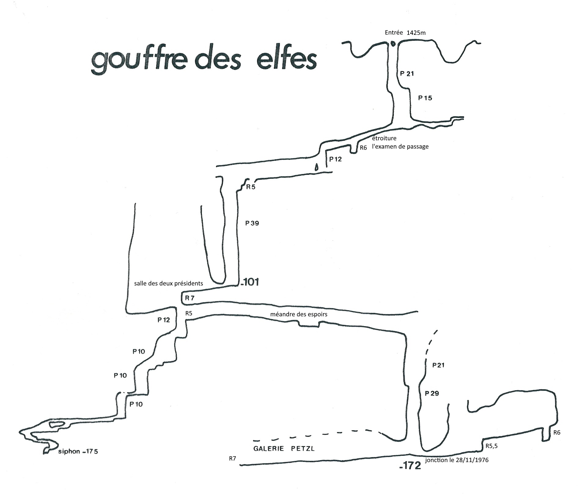 coupe dans le plan vertical du gouffre des Elfes.